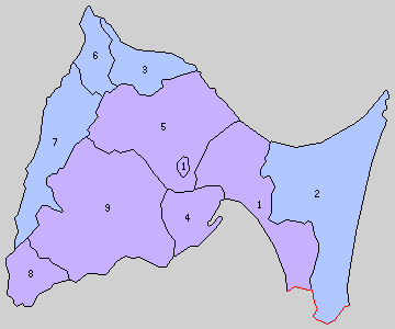 青森県下北郡の町村